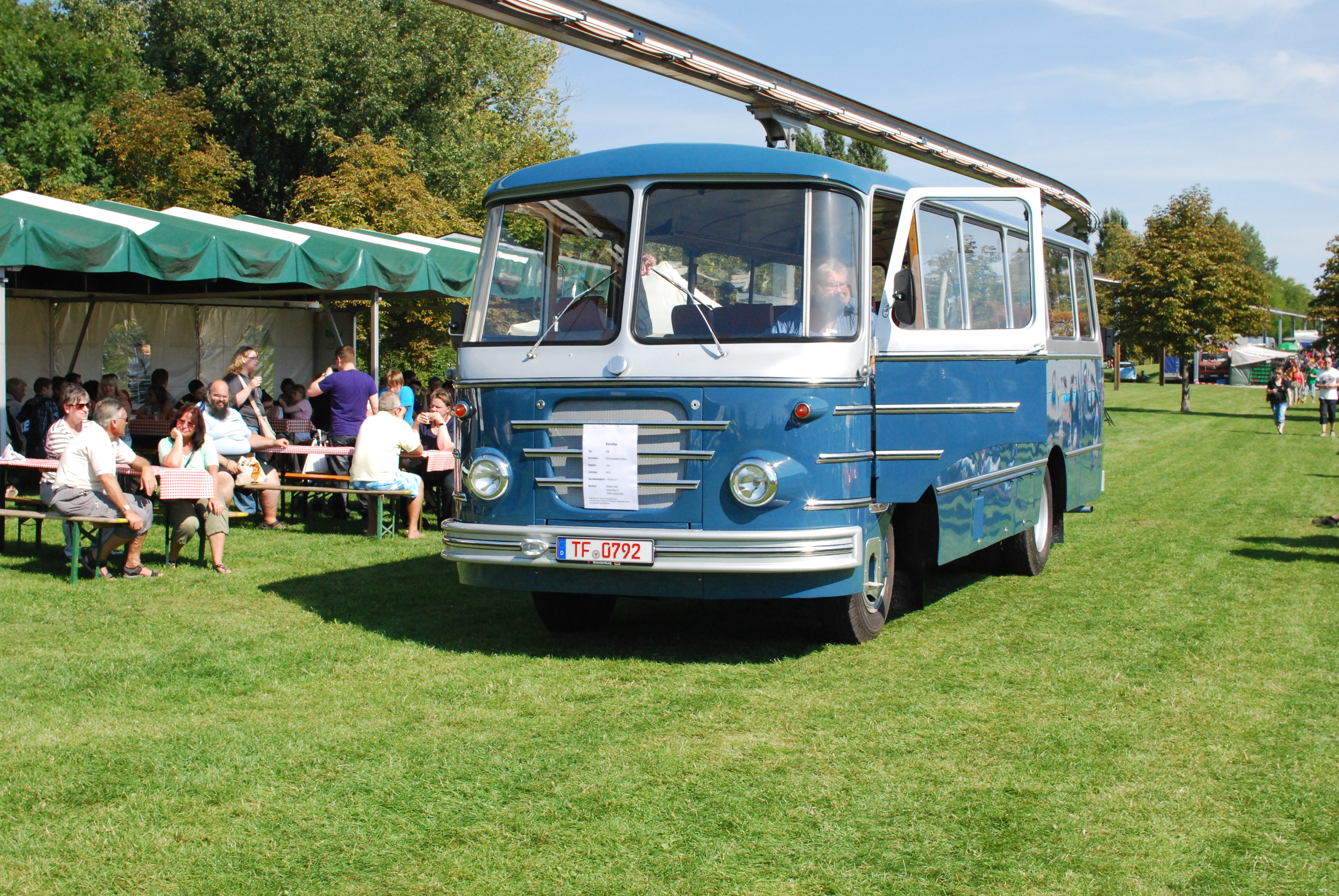 IFA H3B bei der OMMMA 2011 am 3. September 2011 im Magdeburger Elbauenpark